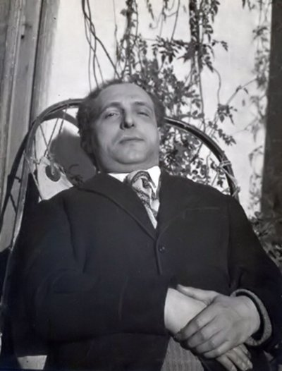 Venerabile Giacomo Gaglione